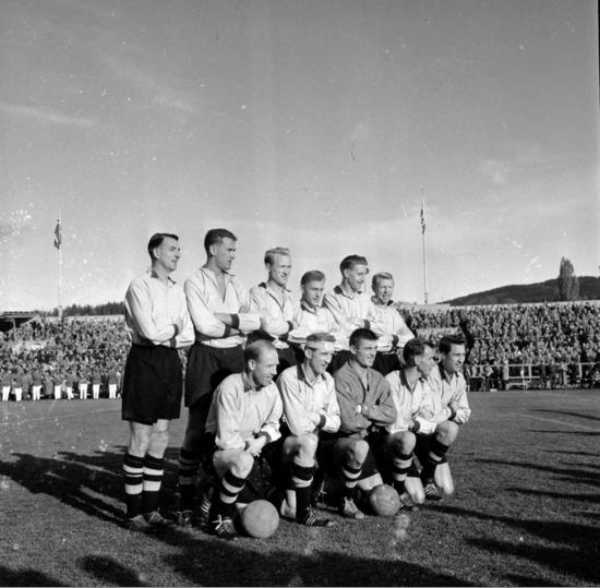 Ballklubbens cupfinalelag 1959